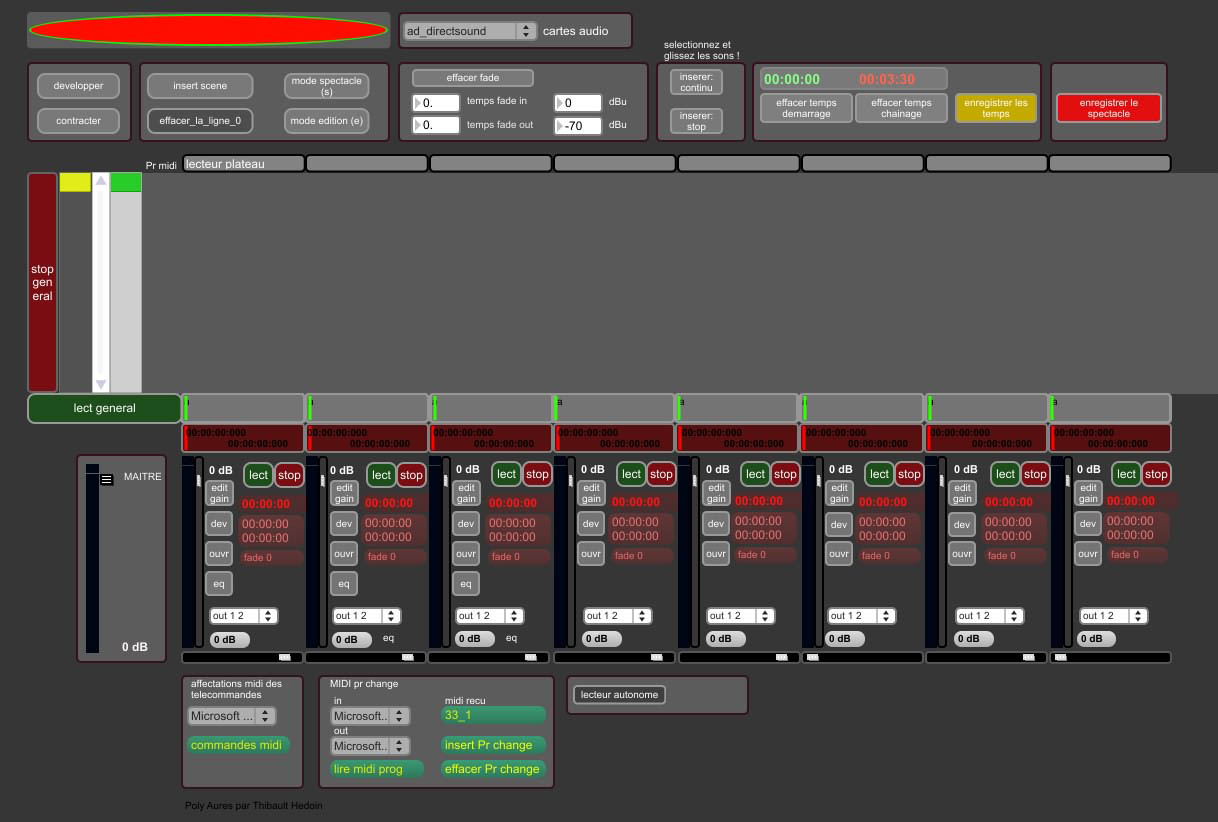 interface de PolyAures